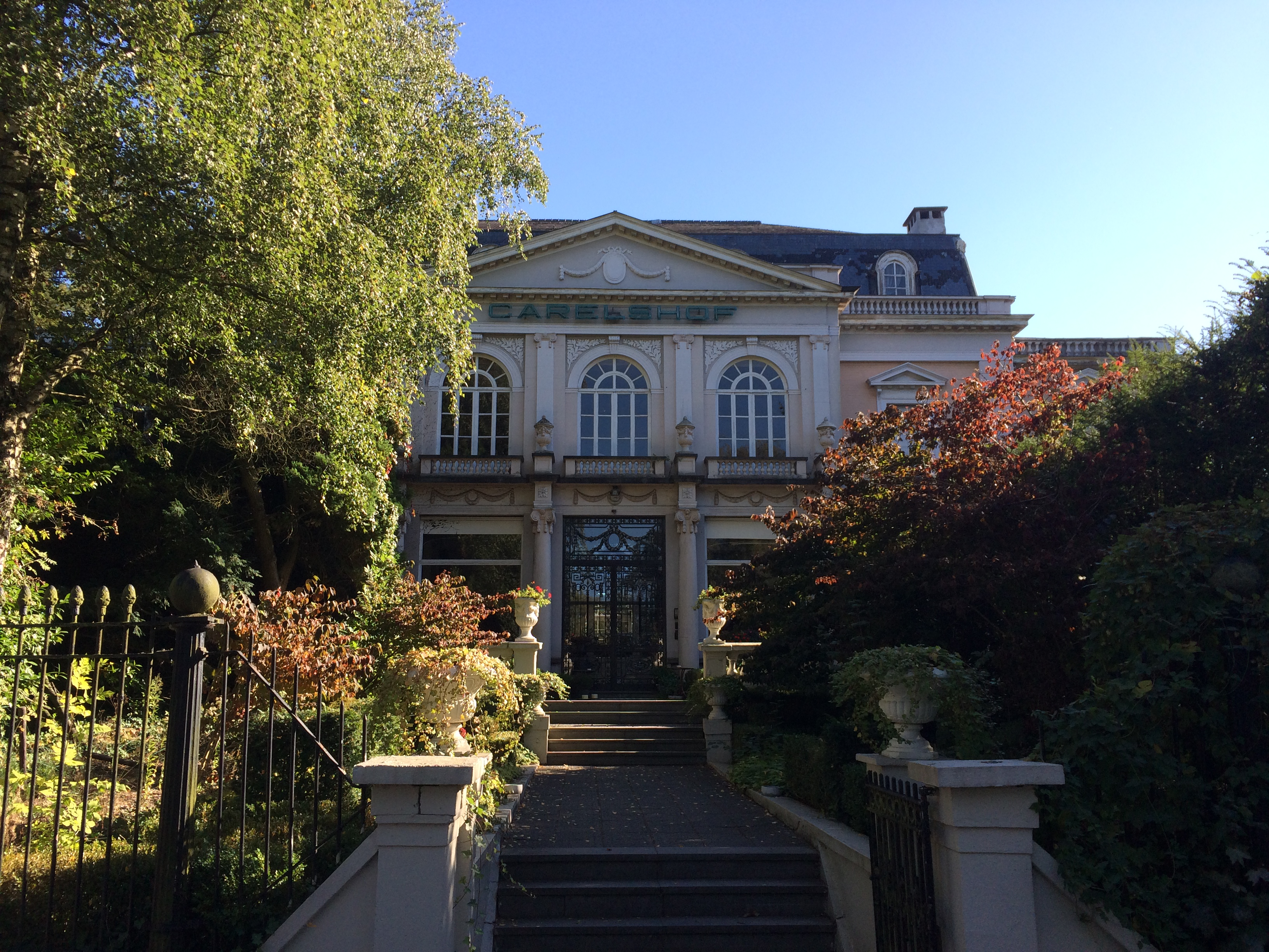 Vooraanzicht met het bordes van het kasteel Carelshof